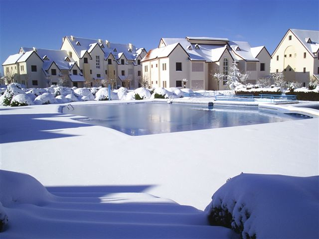 Residance Ifrane osus la neige